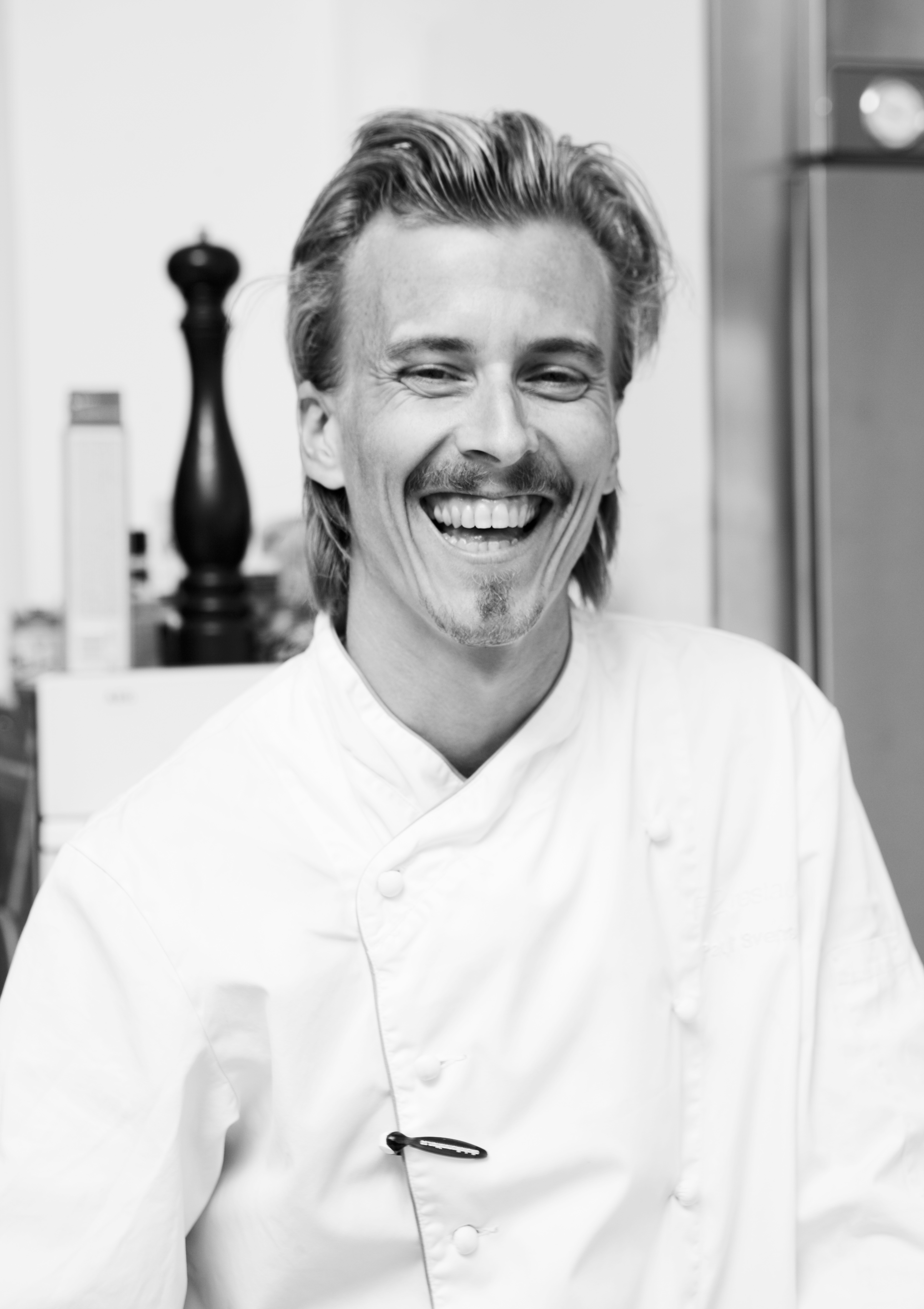 Kocken och krögaren Paul Svensson.